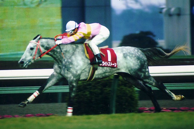 white stone AJCC